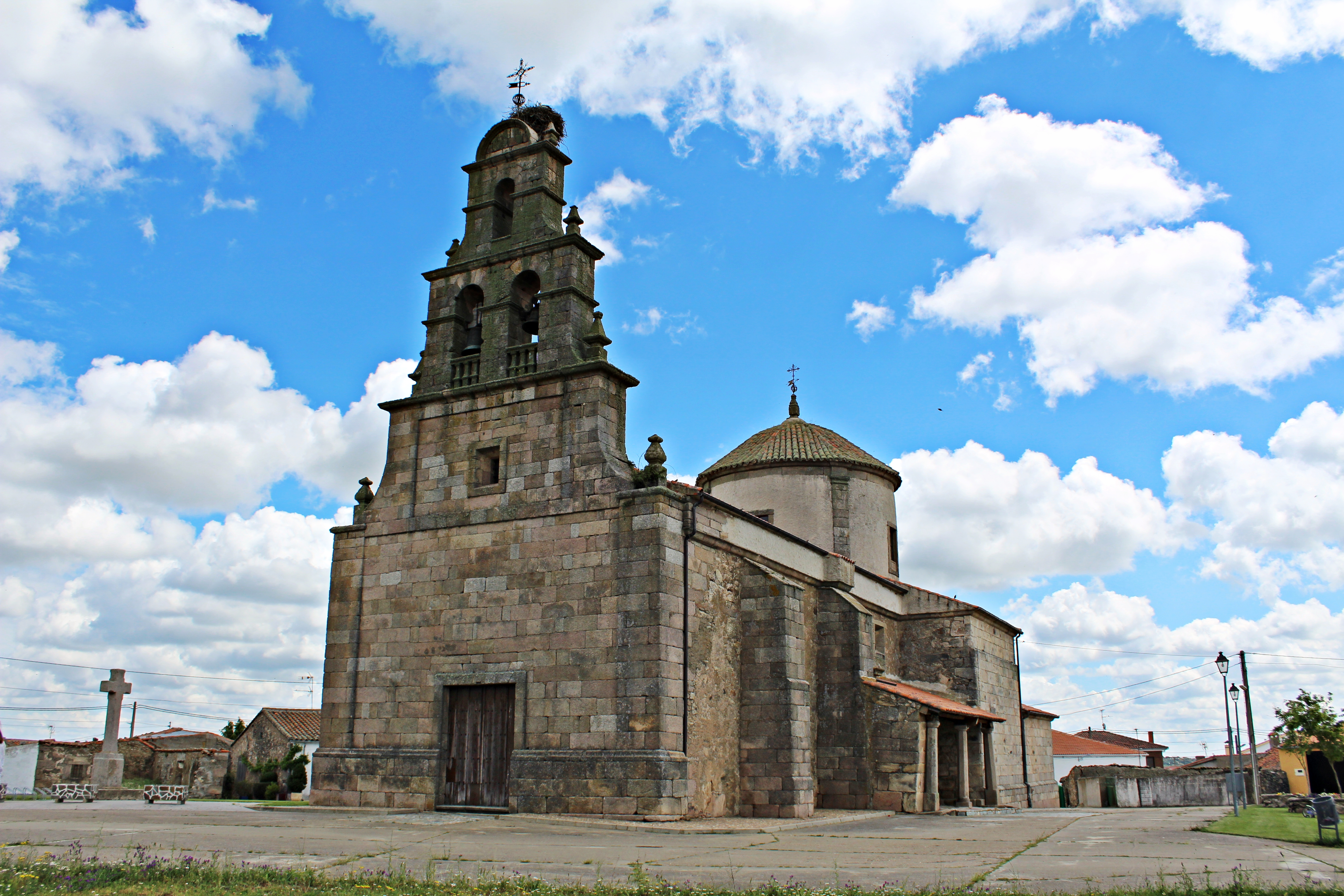 Iglesia de Santa María de Sando en su vista frontal, provincia de Salamanca